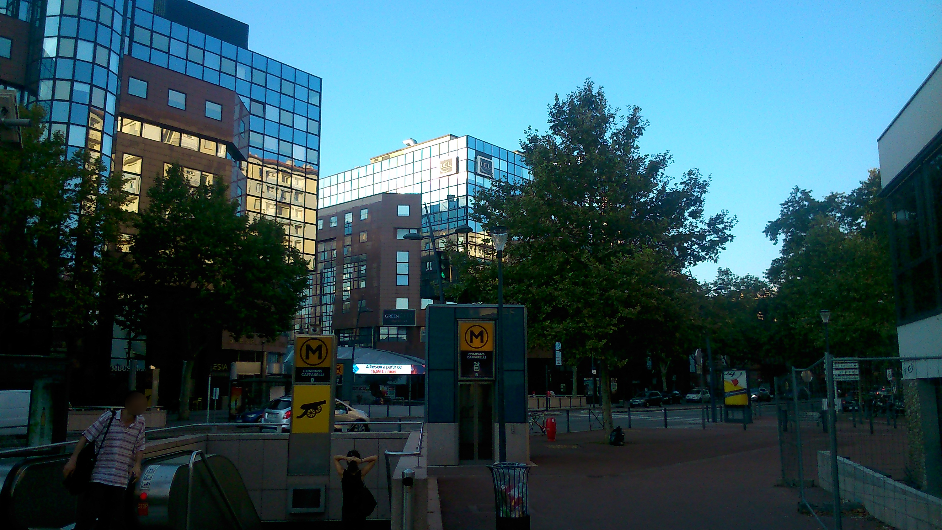 L'esplanade Compans Caffarelli à Toulouse sur le boulevard Lascrosses vue depuis la cité administrative